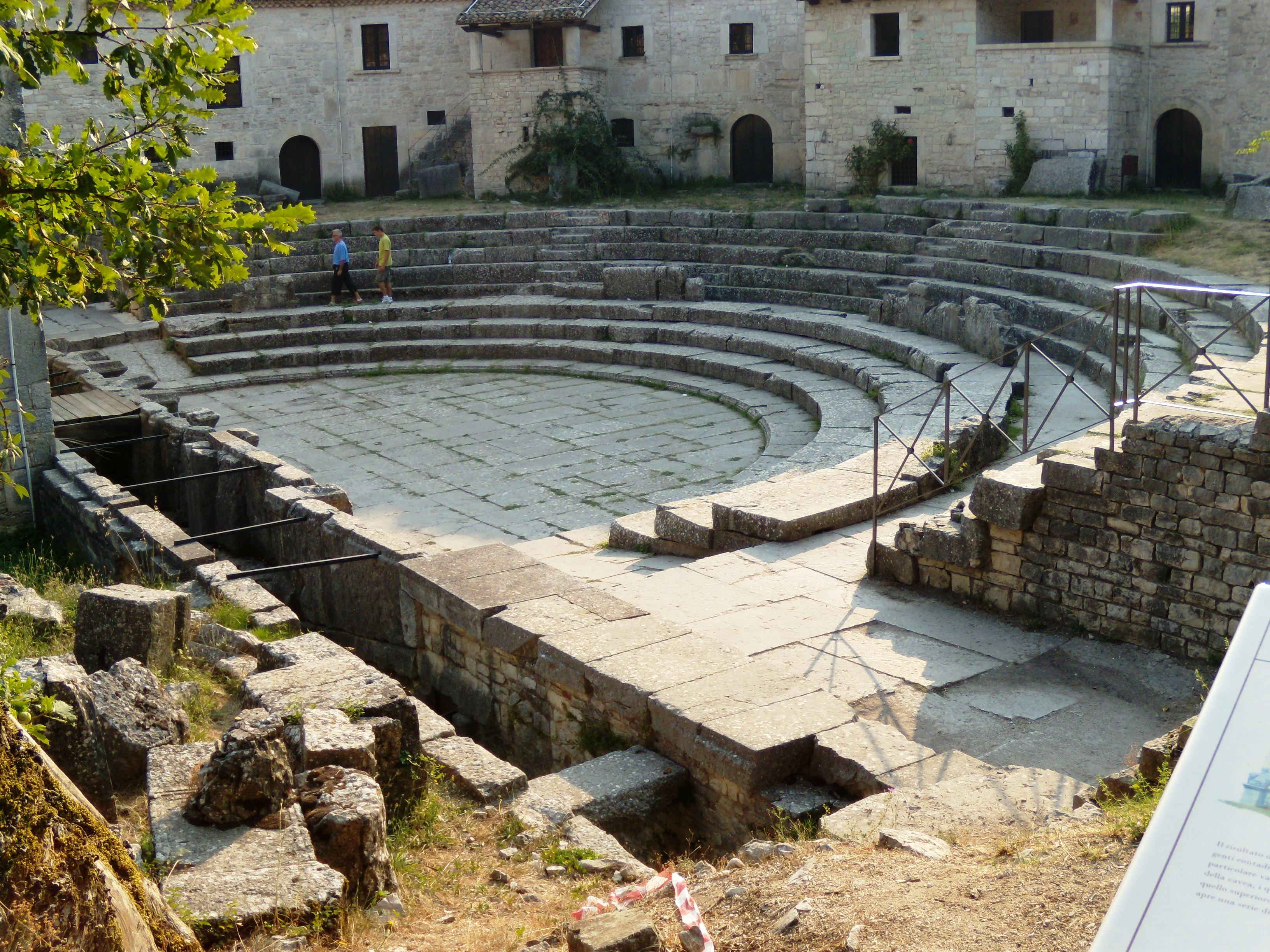 Scavi archeologici di Saepinum (Italy): il teatro di epoca romana.